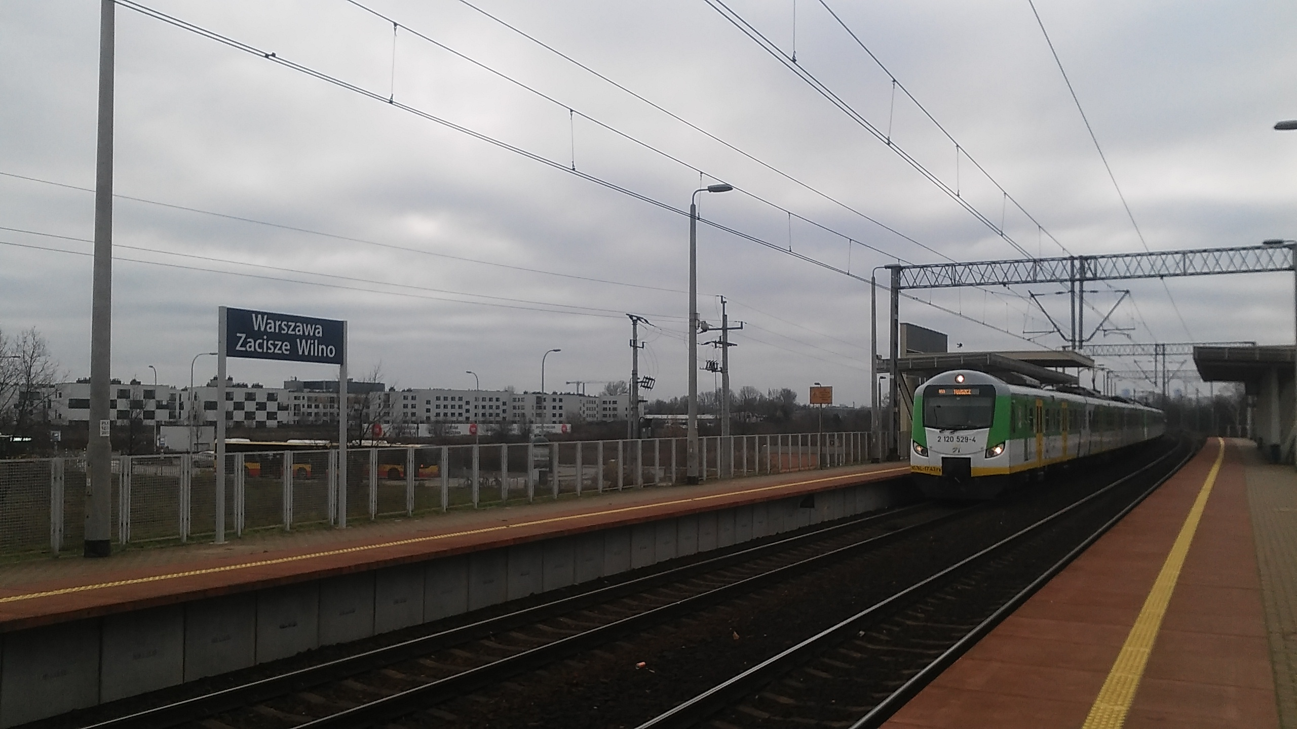 przystanek kolejowy Warszawa Zacisze-Wilno - pociąg osobowy Kolei Mazowieckich KM 11629 relacji Warszawa Wileńska - Tłuszcz